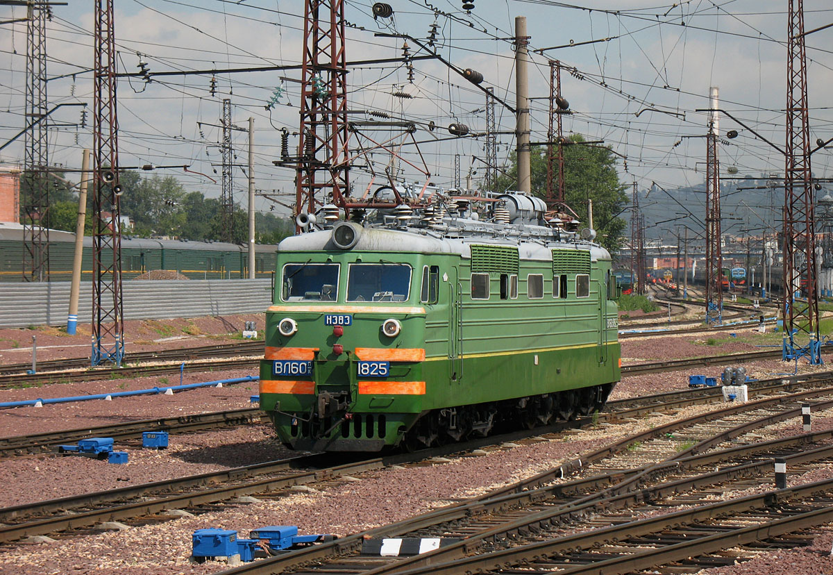 Электровоз ВЛ60ПК-1825 Россия, Красноярский край, станция Красноярск